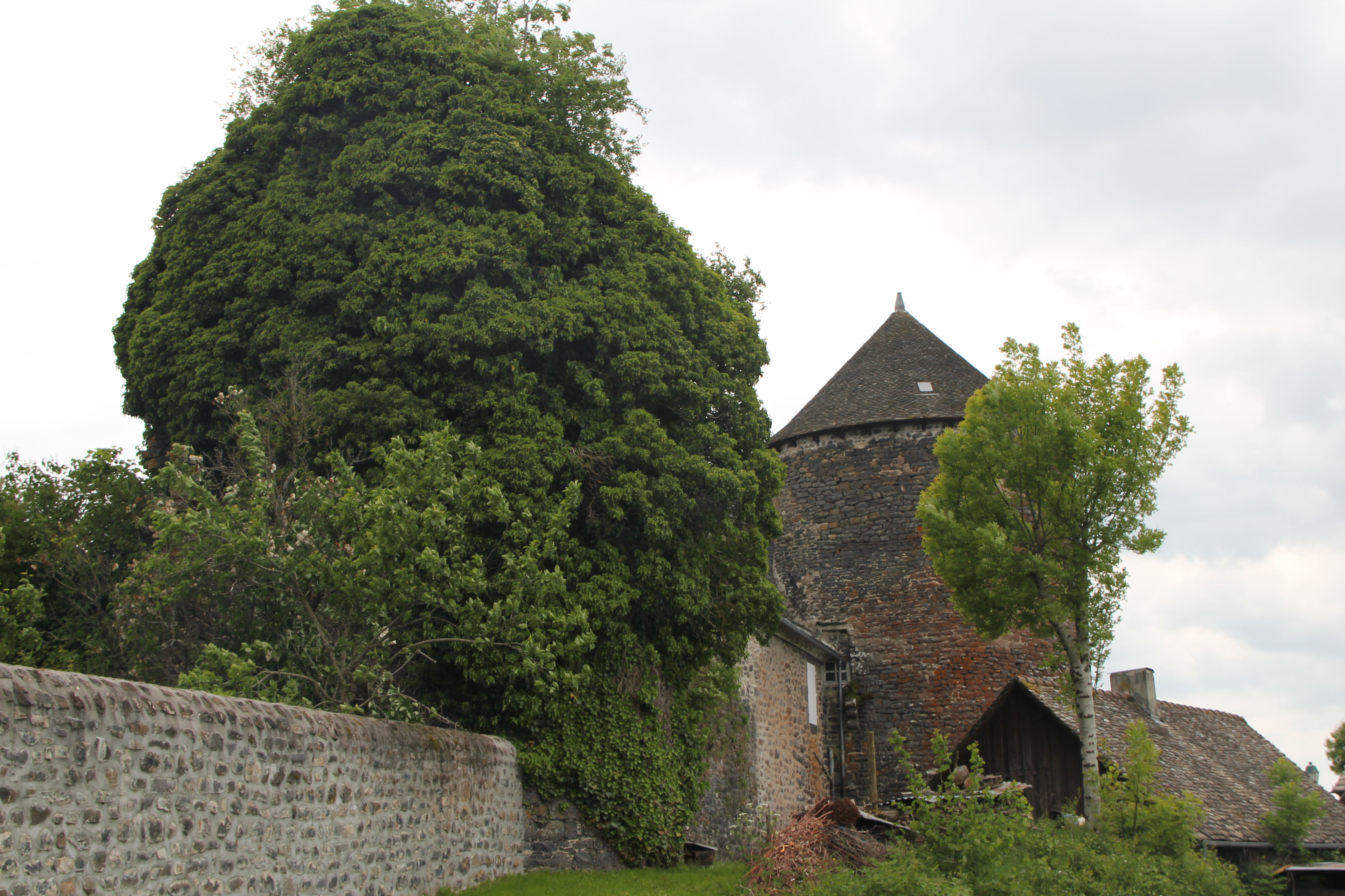 Château d'Escorailles - Tour Nord-Ouest ouverte de lierre